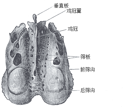 筛骨俯视图